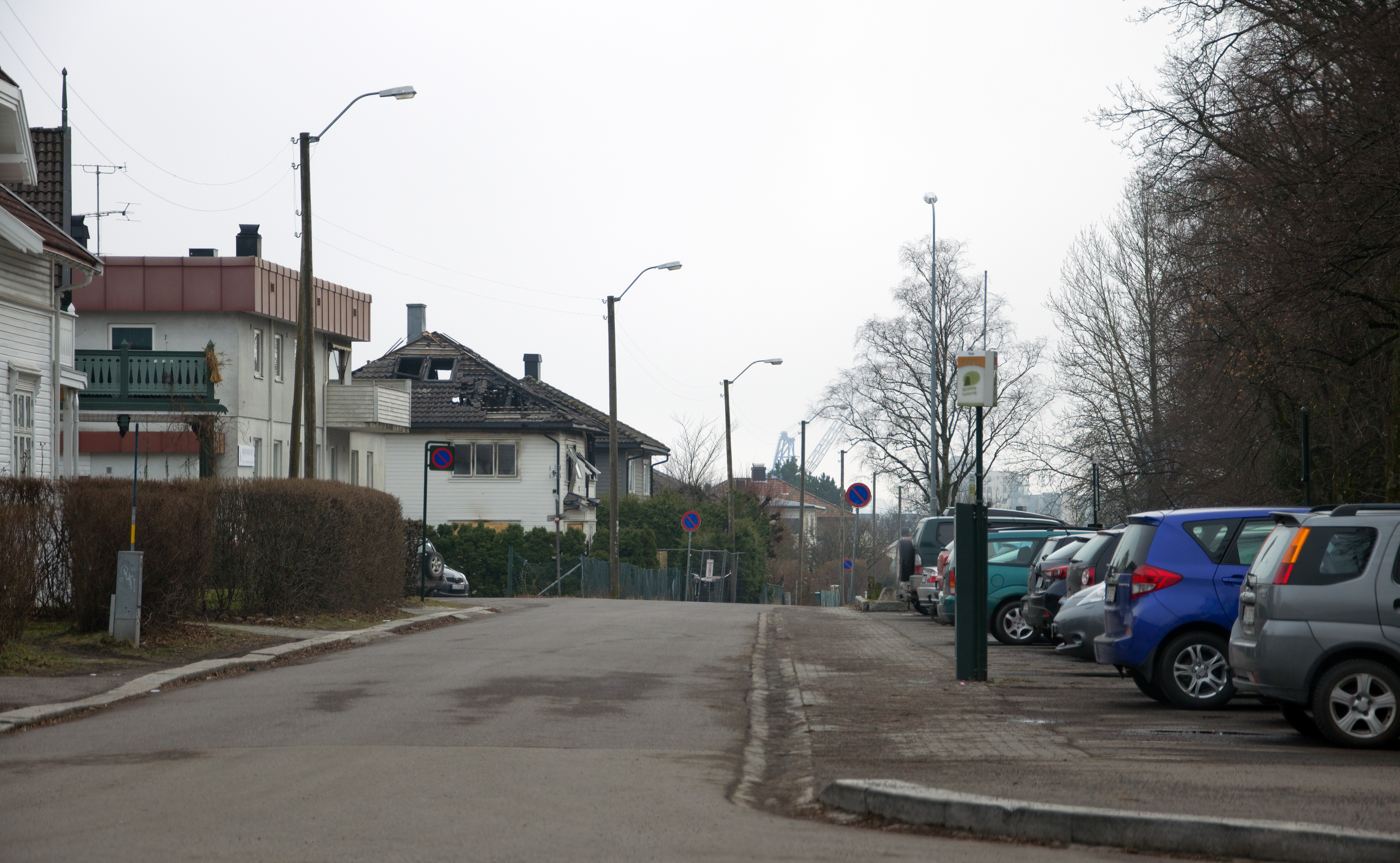 Vestfoldgaten, Tønsberg